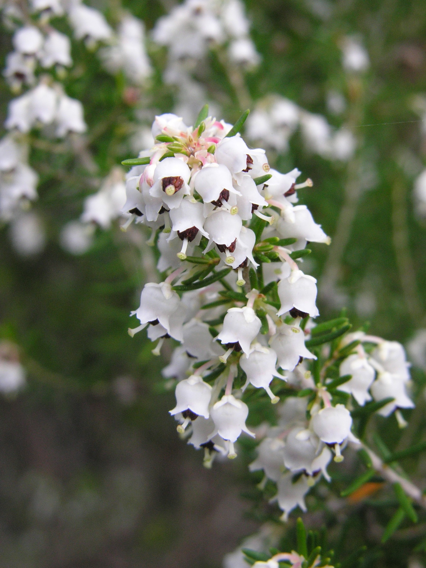 Flores de Erica arborea. Córcega.